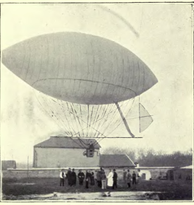 Começo do N. 3.